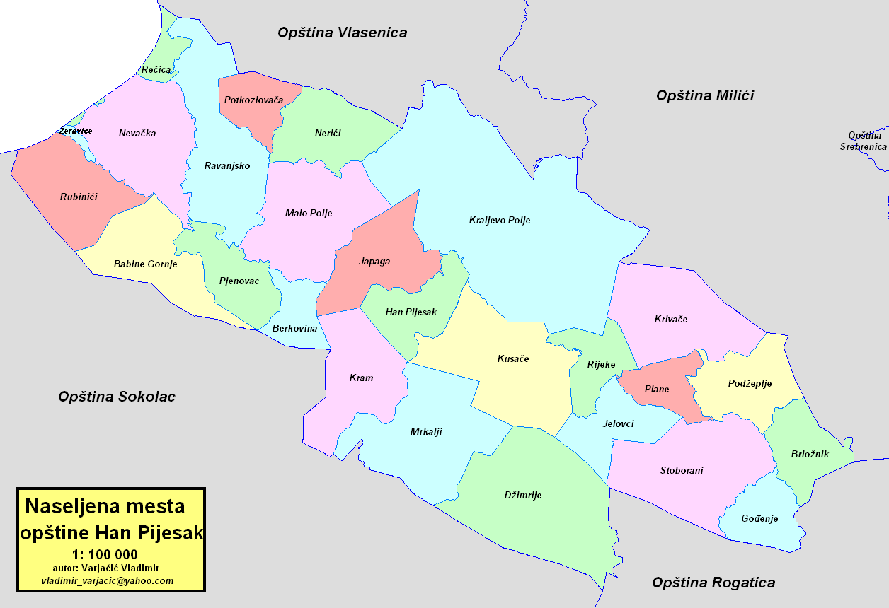 Opština Han Pijesak